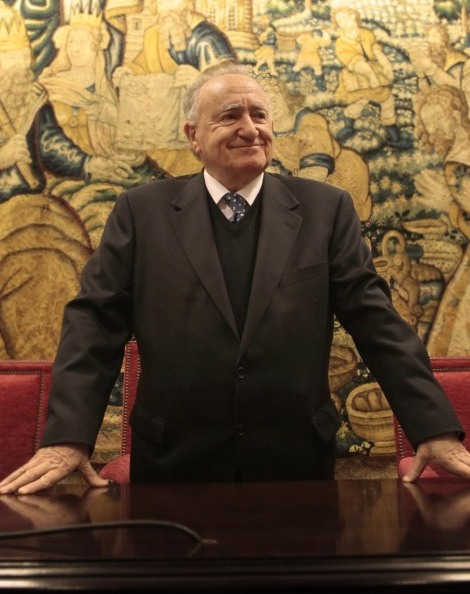 Alonso Montero, tras ser elixido presidente da RAG en abril de 2013.